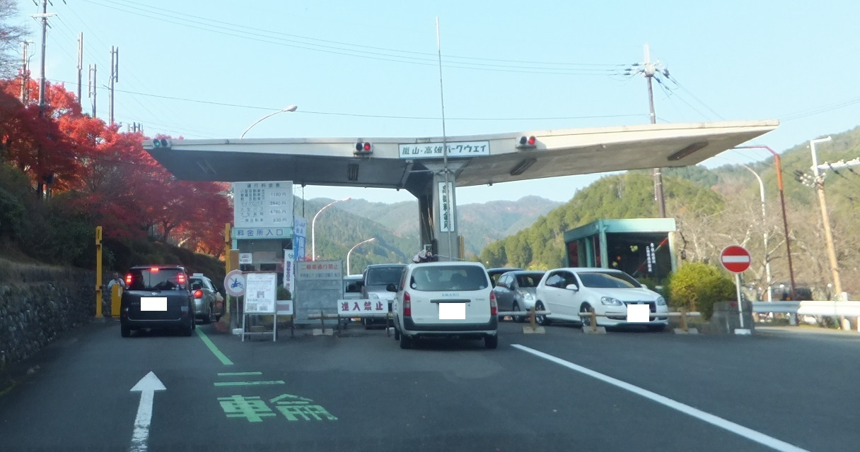 高雄料金所 嵐山高雄パークウェイ